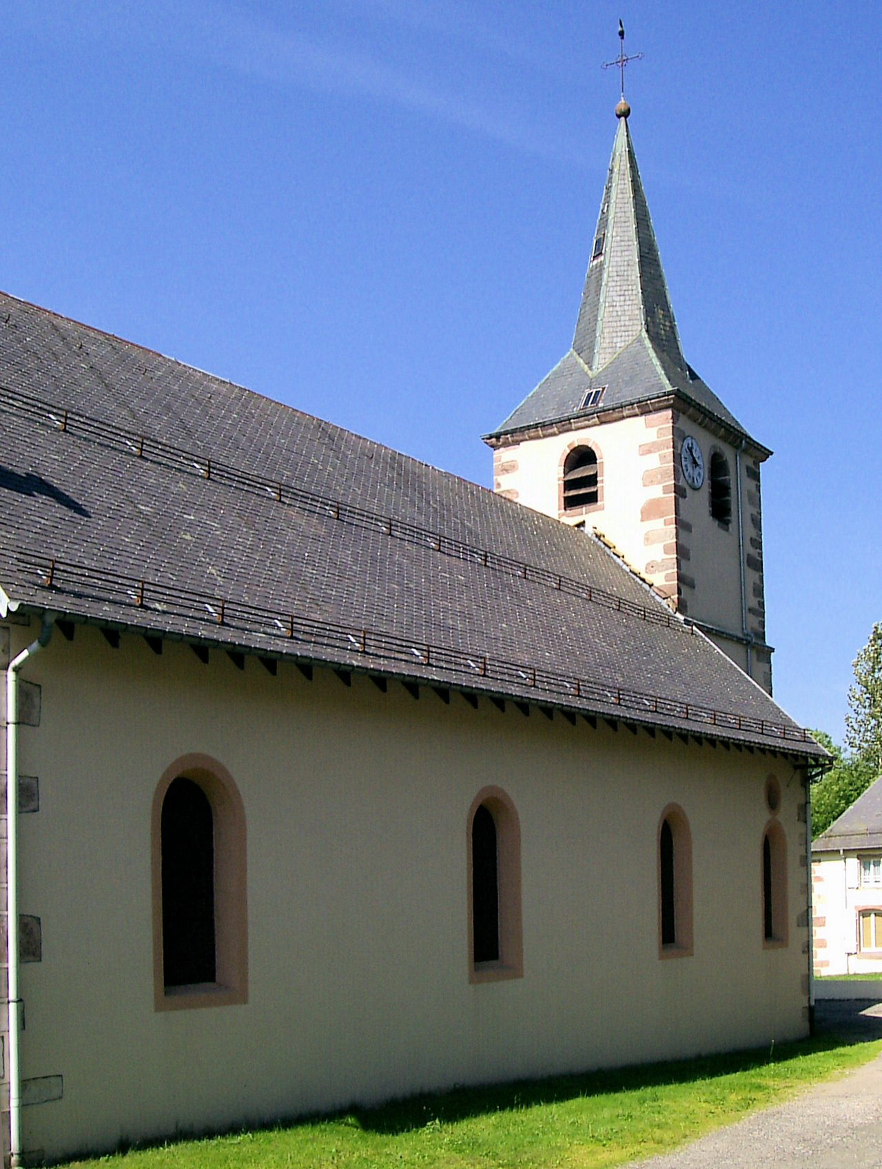 L'église Saint-Blaise à Rochesson